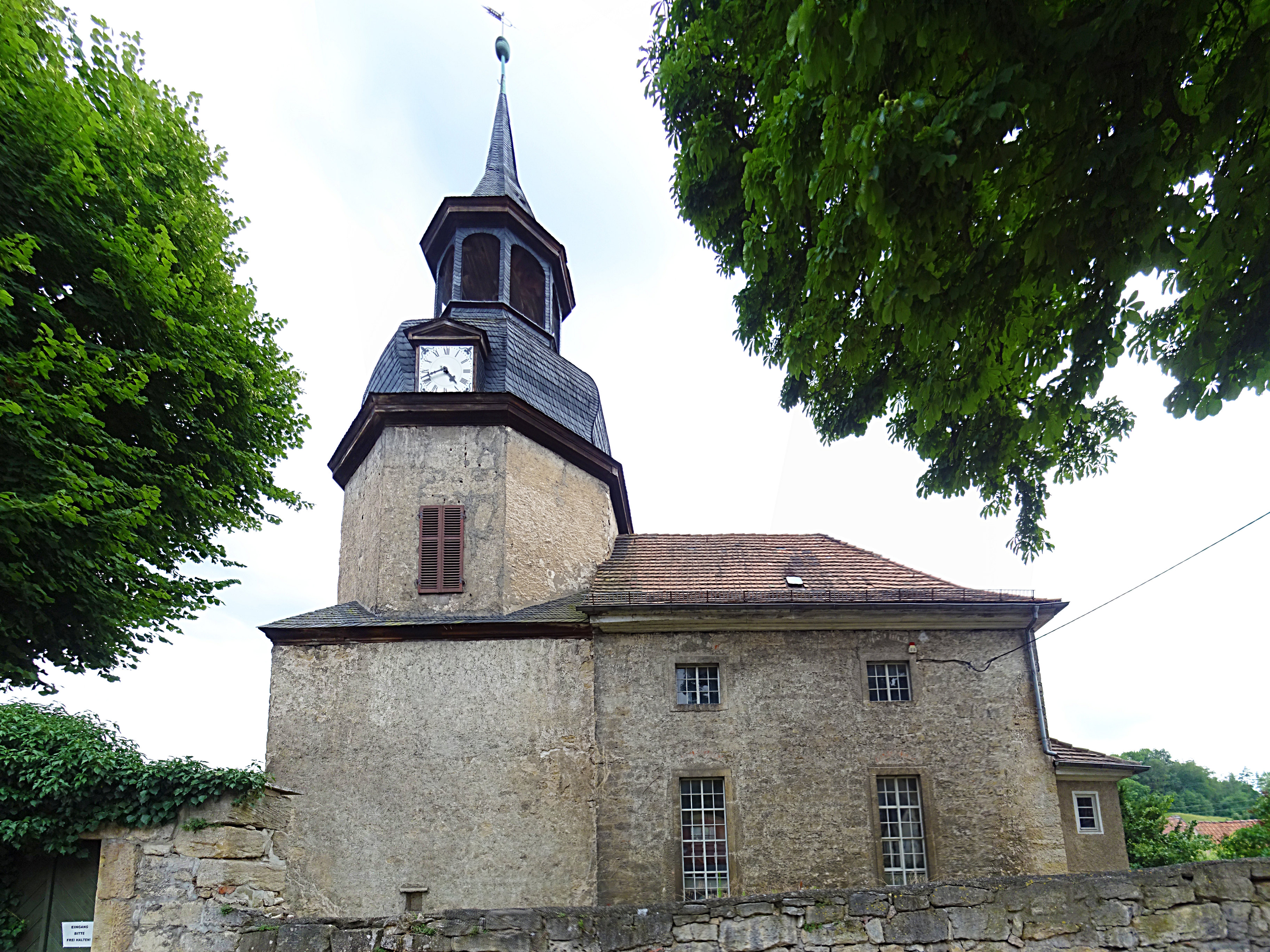 Dorfkirche Ammerbach von Norden